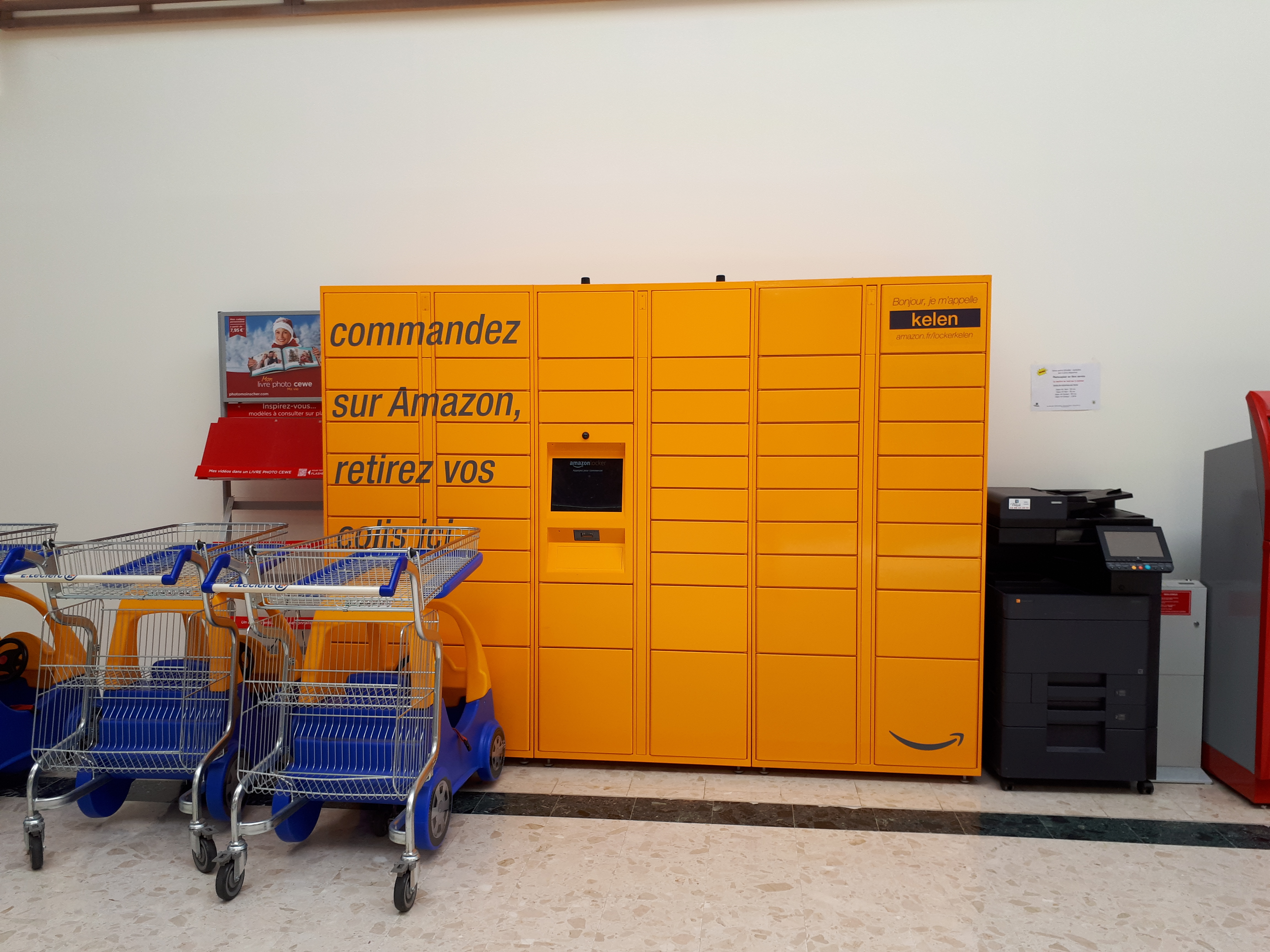 Un casier Amazon Locker à Guilers dans le Finistére.